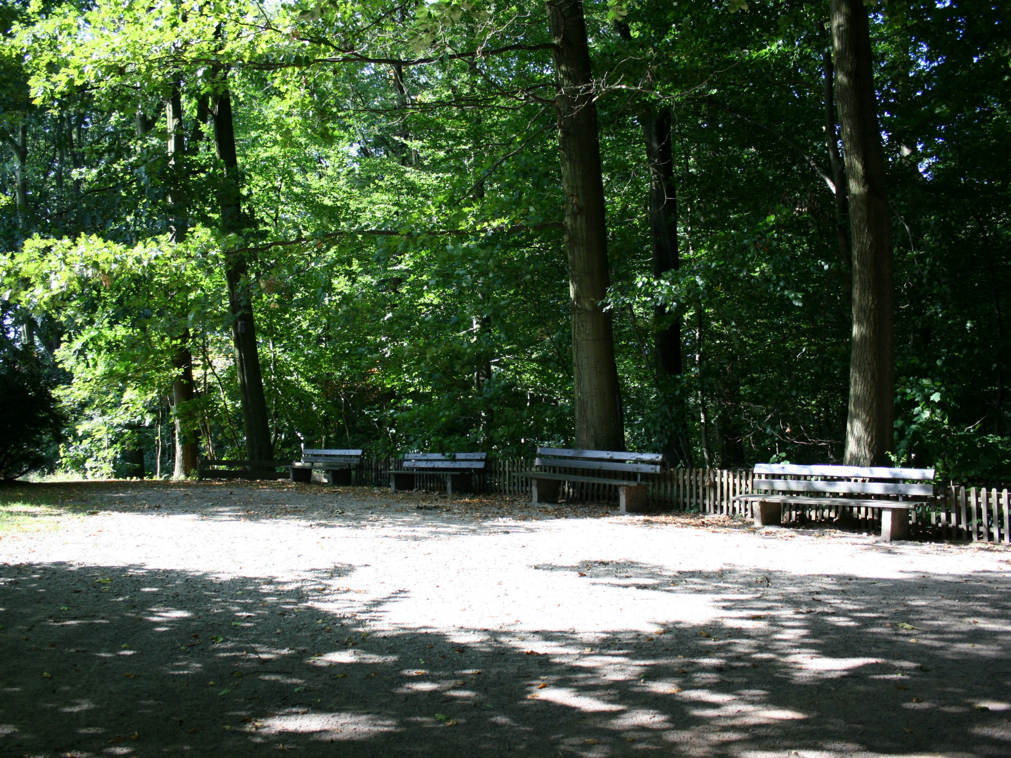 Wuppertal-Ronsdorf: Ronsdorfer Anlagen